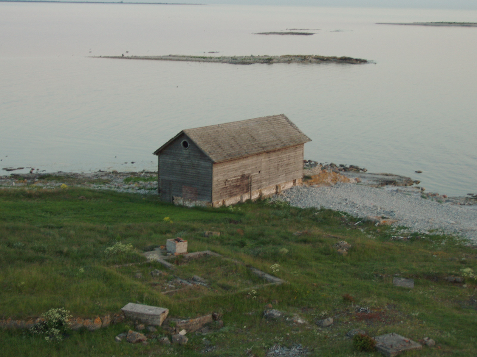 Vilsandi päästejaama paadikuur ja osa Vaika saartest.